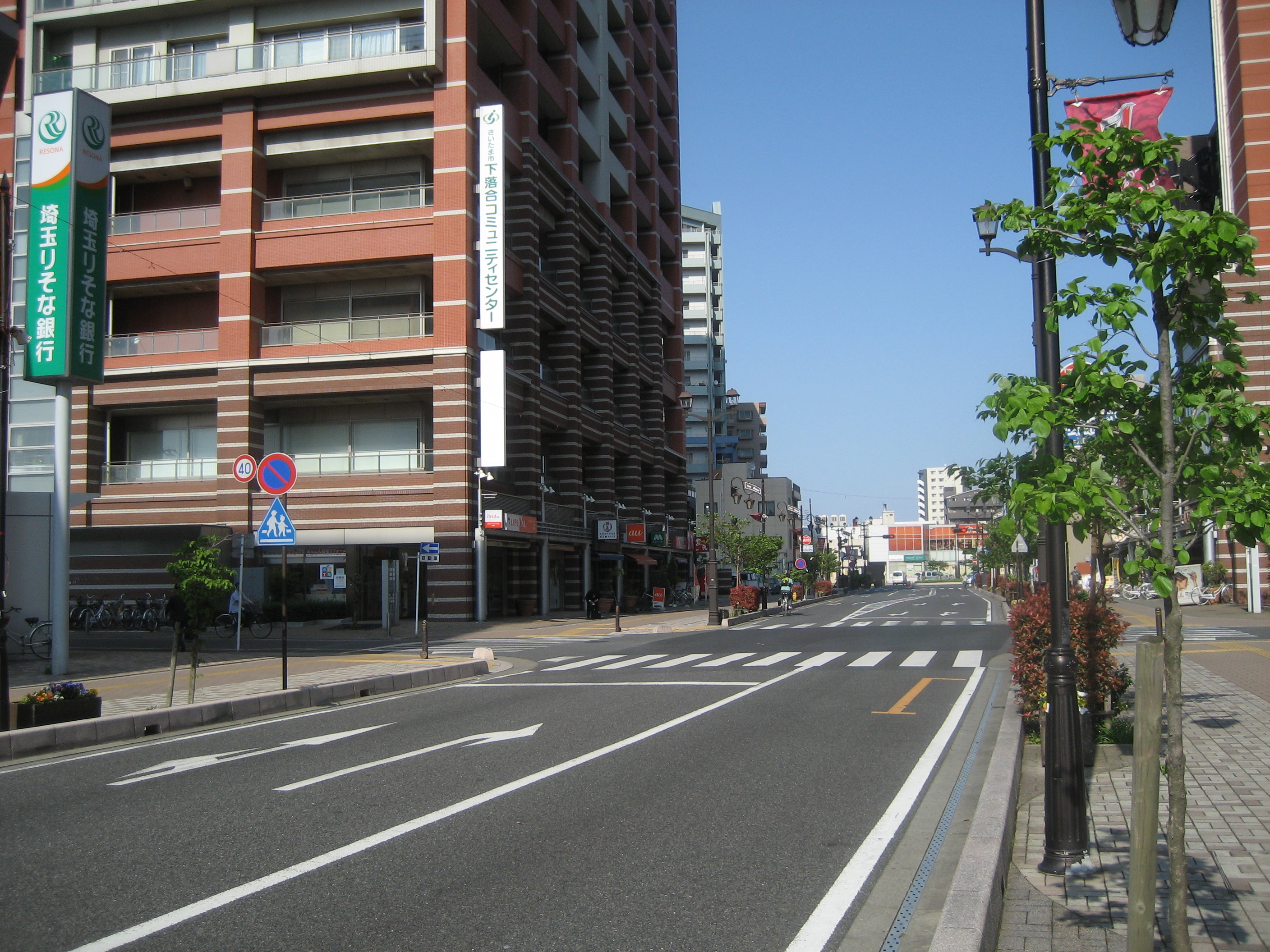 埼玉県道119号線さいたま市中央区下落合付近（与野駅西口方向を撮影）